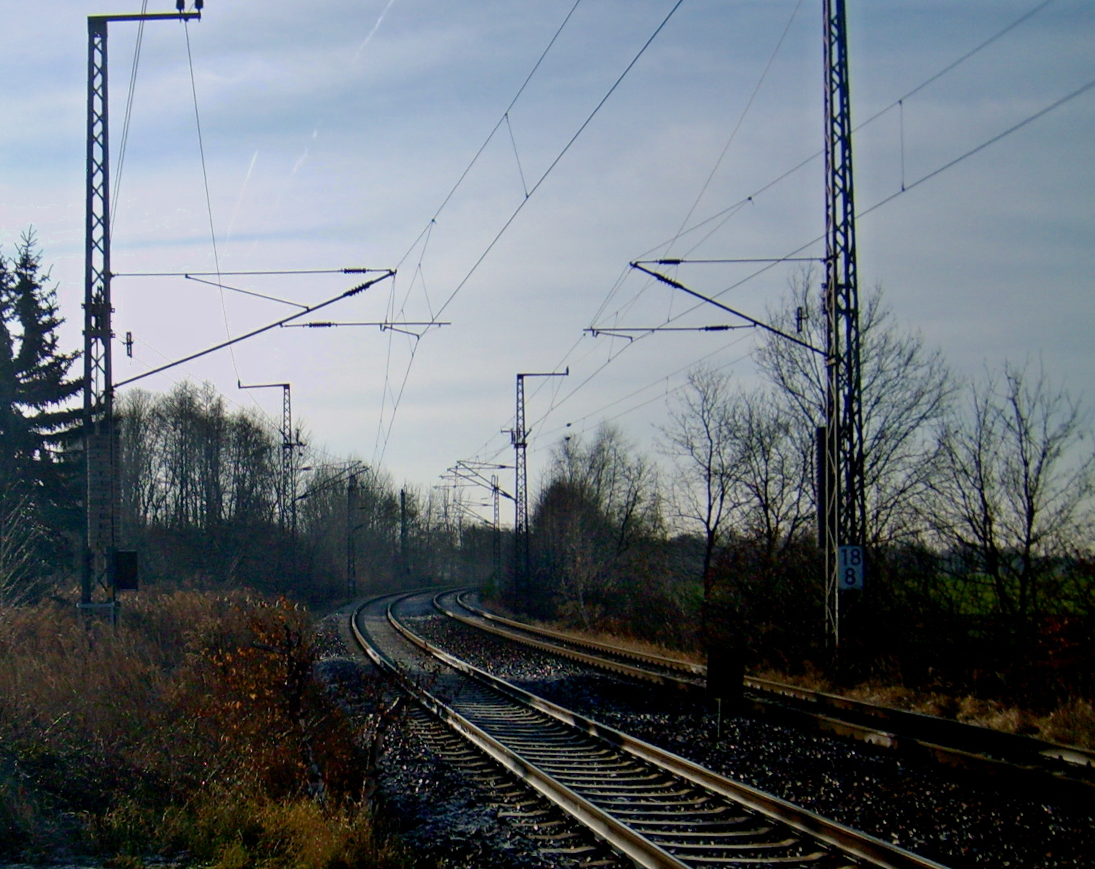 Bahnübergang im Elsterwerdaer Ortsteil Kotschka